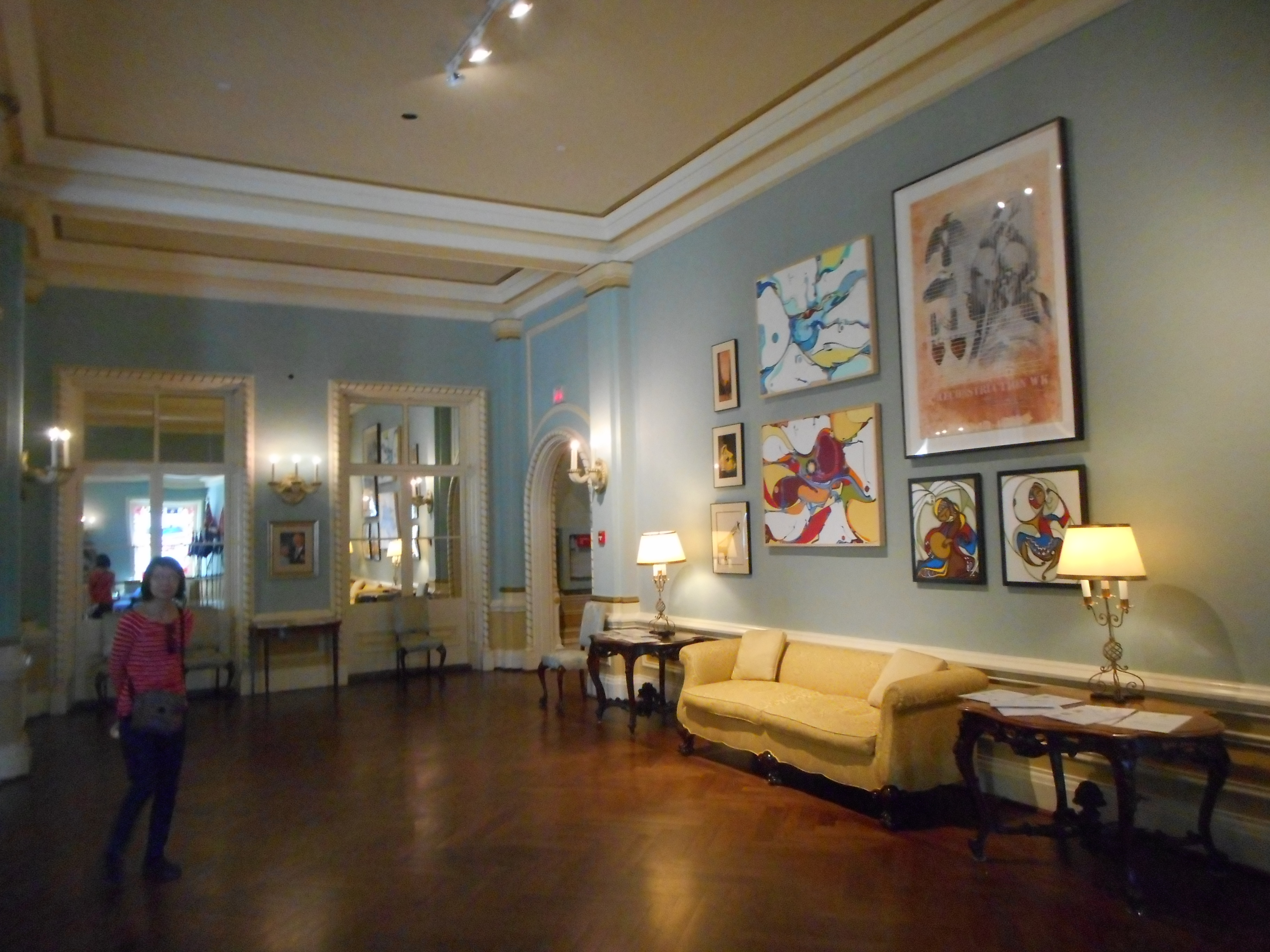 Rideau Hall, Ottawa